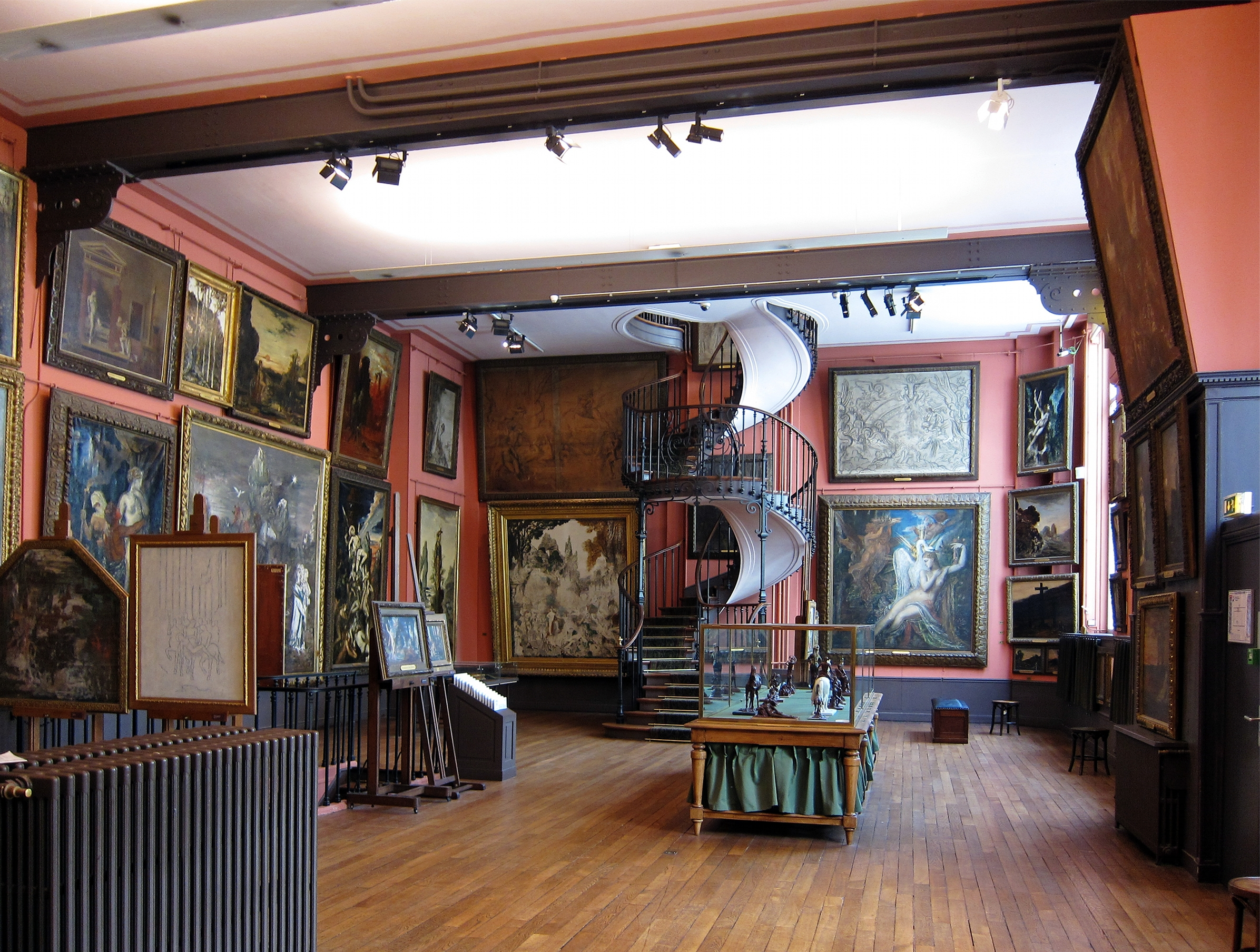 Le premier étage de l'atelier au musée Gustave-Moreau.